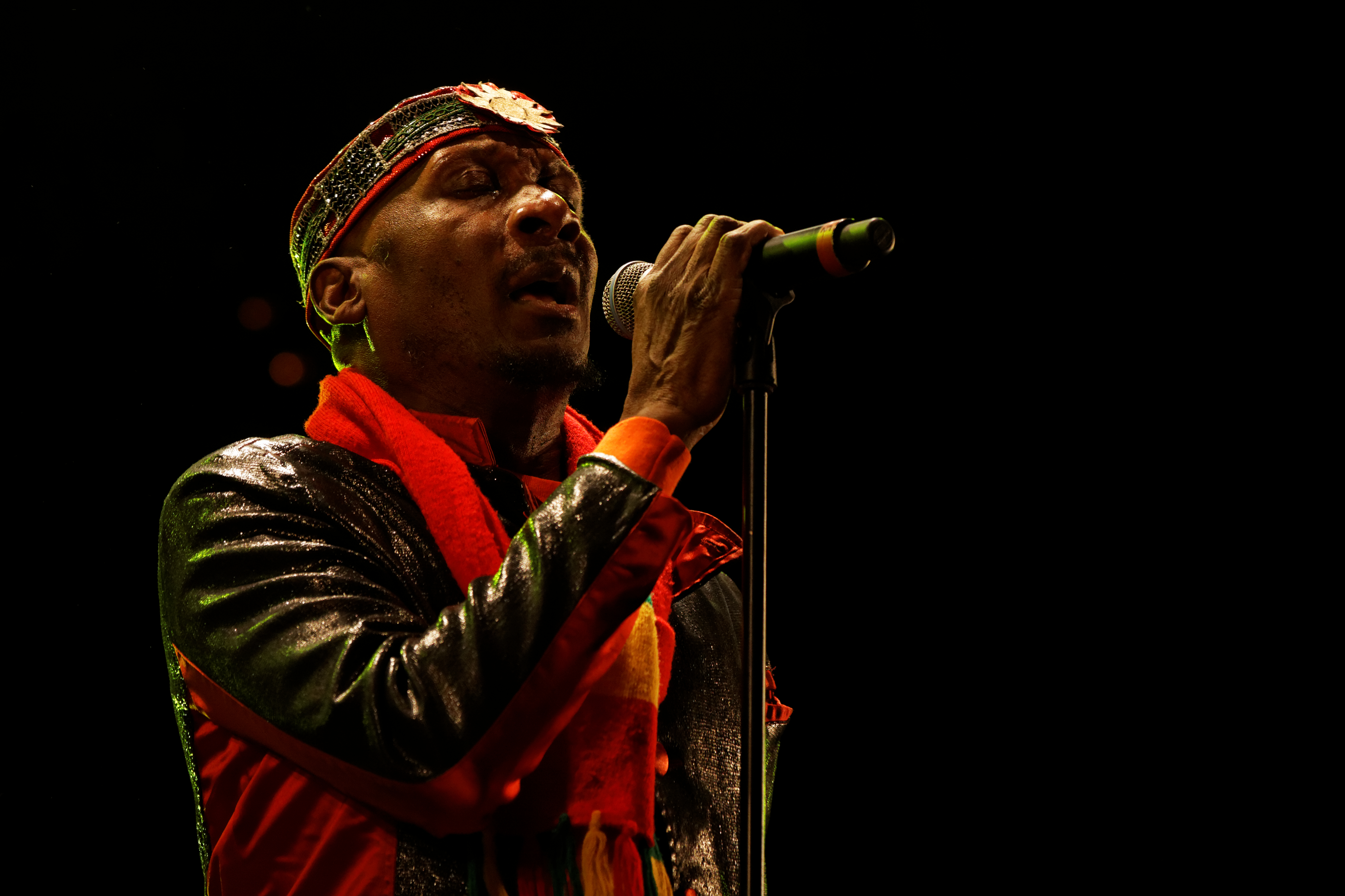 Jimmy Cliff en concert sur la scène Landaoudec lors du festival du bout du Monde à Crozon dans le Finistère (France).